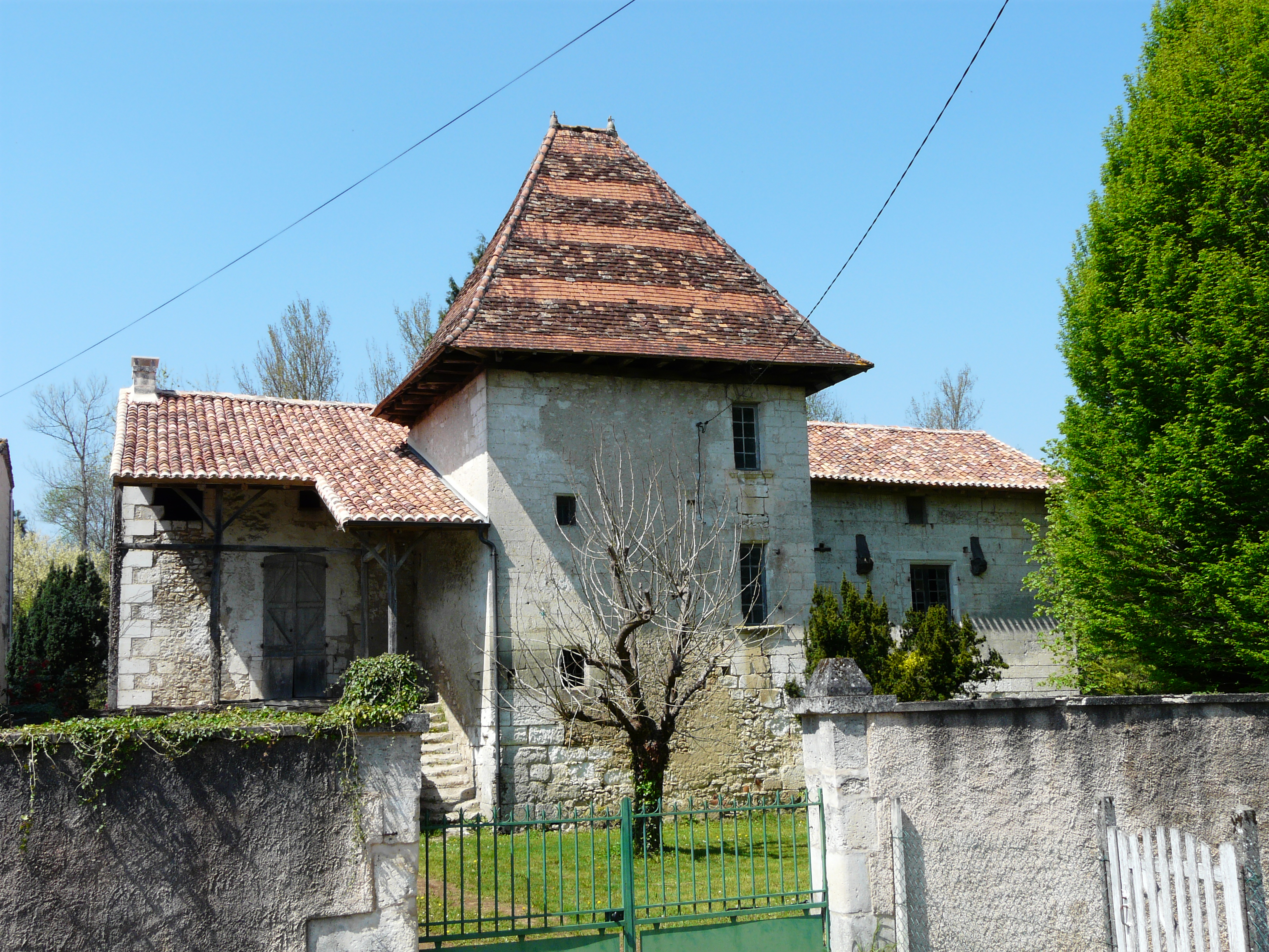 La chartreuse de Quinsac, Dordogne, France